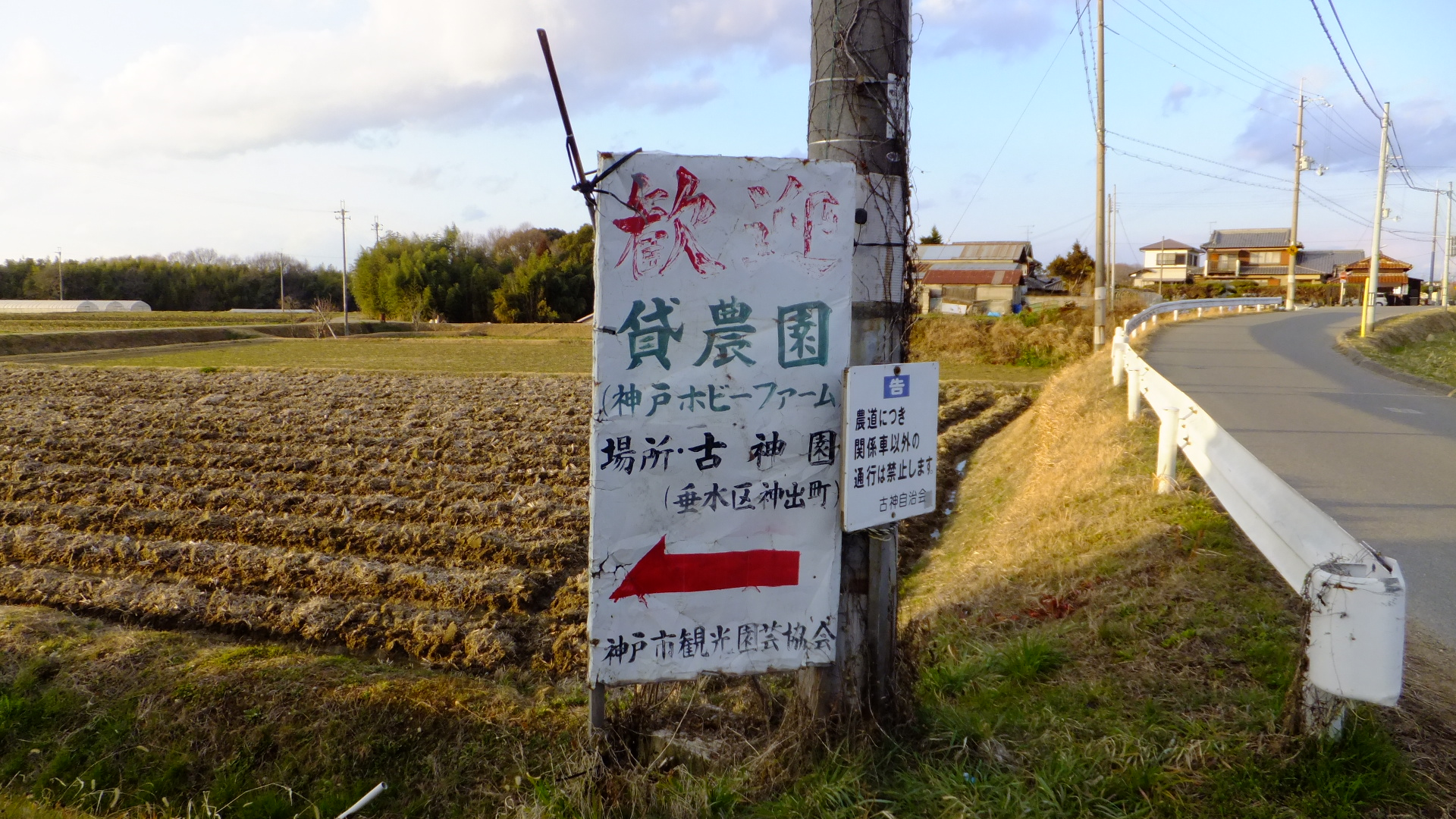 兵庫県神戸市西区神出町小束野にある看板（神戸市西区が誕生する前は垂水区であった。）